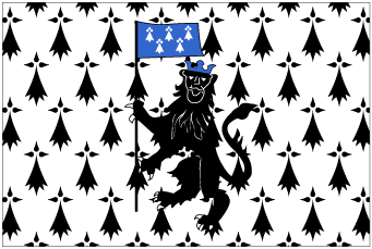 Drapeau de la ville de Ploermel Bretagne